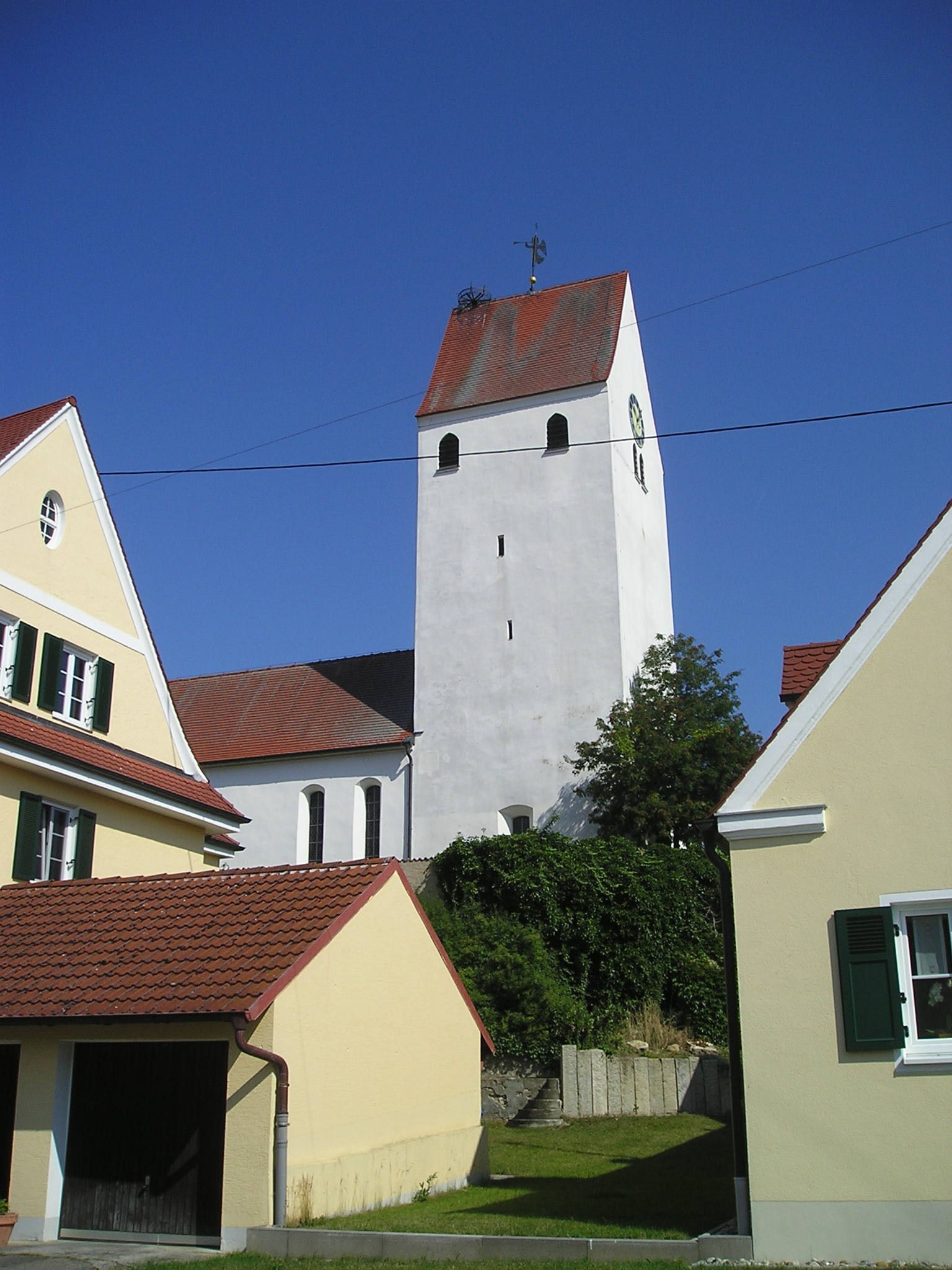 Bühl i. Ries, Gemeindeteil von Alerheim im Landkreis Donau-Ries (Bayern), Evang. St.-Marien-Kirche